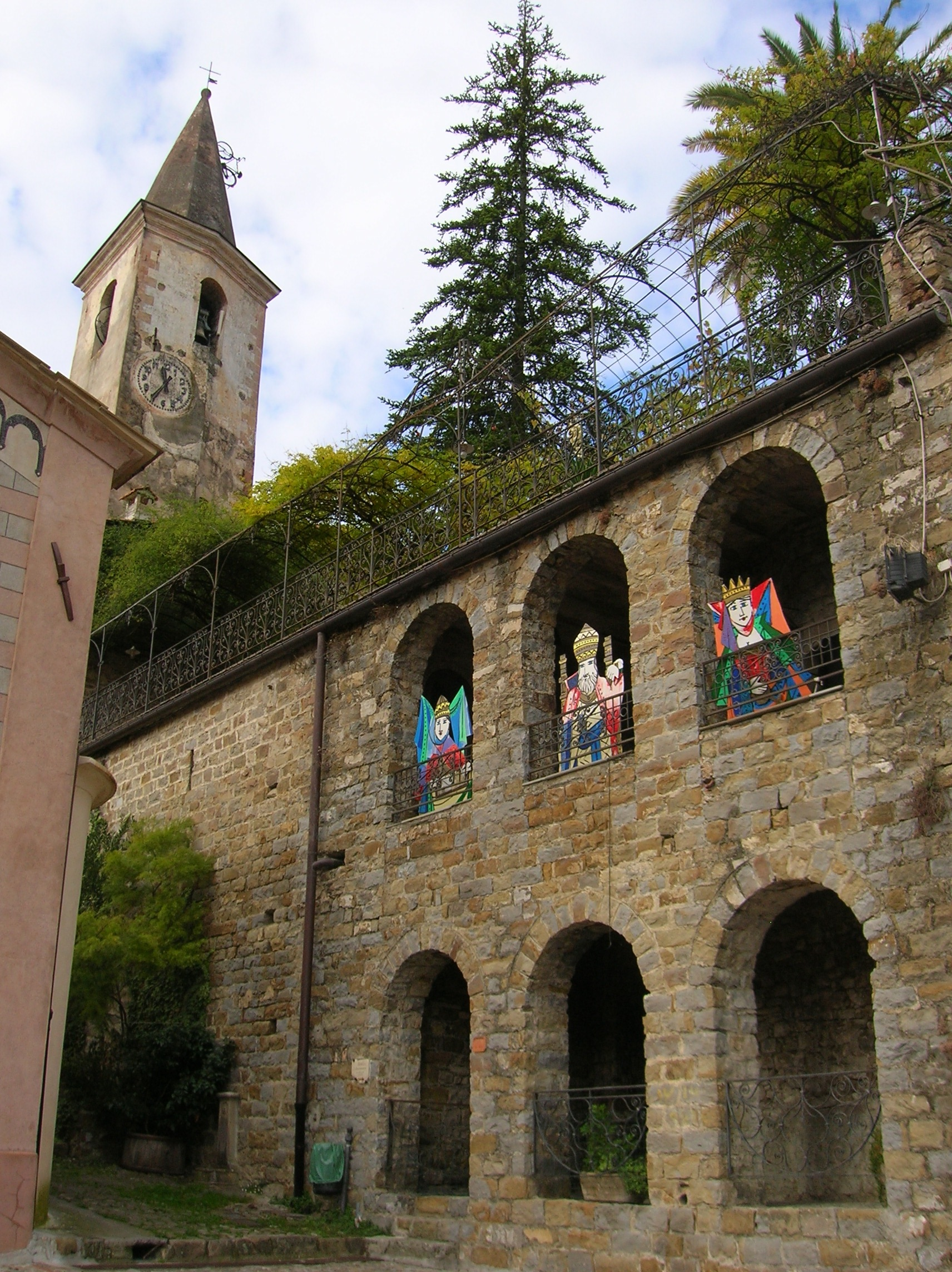 Castello della Lucertola. Apricale, Liguria, Italia.